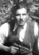 Josef Serinek (1900-1974), československý příslušník protinacistického odboje romské národnosti